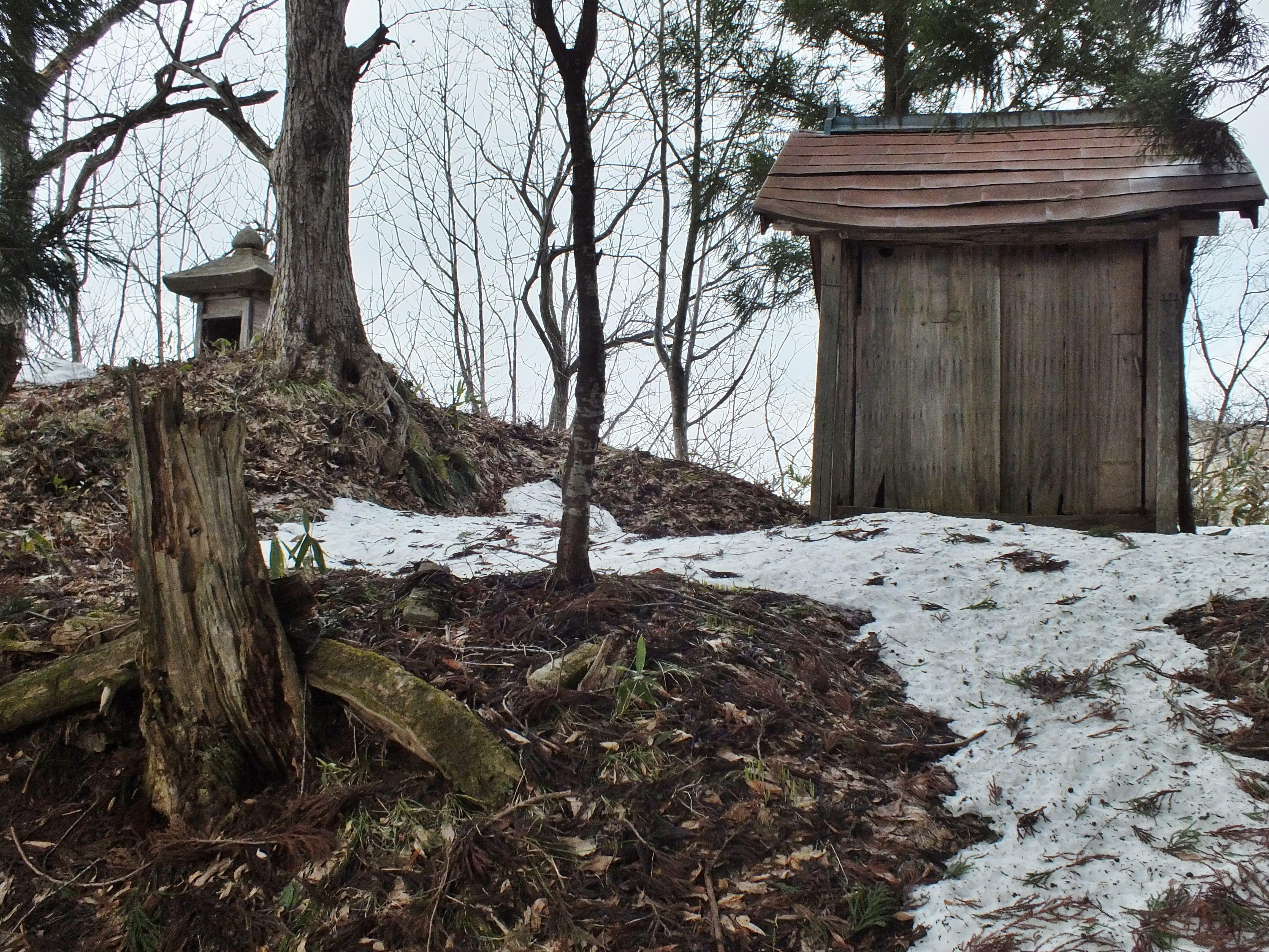 背中炙り峠に万年堂と乳母木地蔵堂がひっそりと佇む。